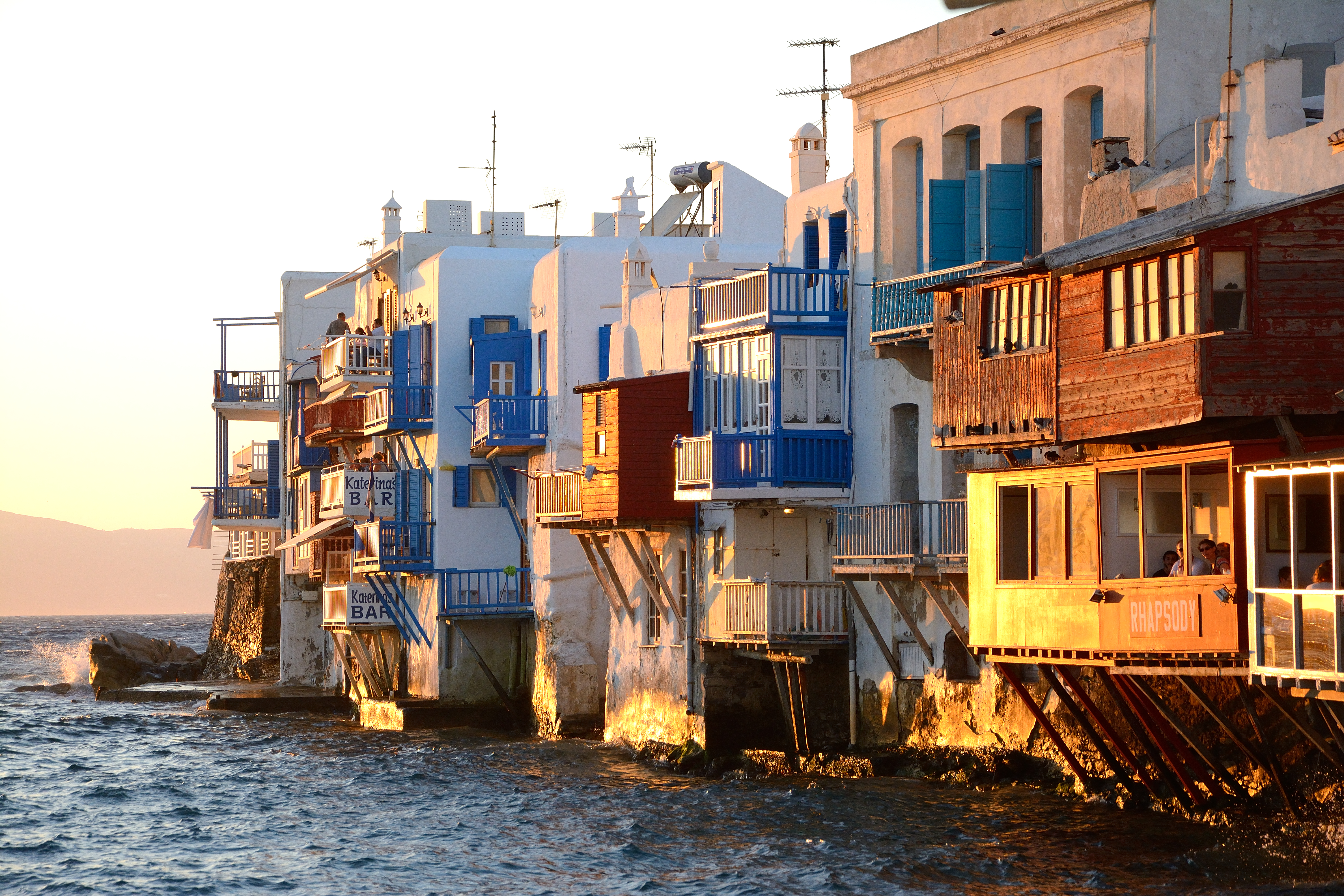 Mikonos, al atardecer